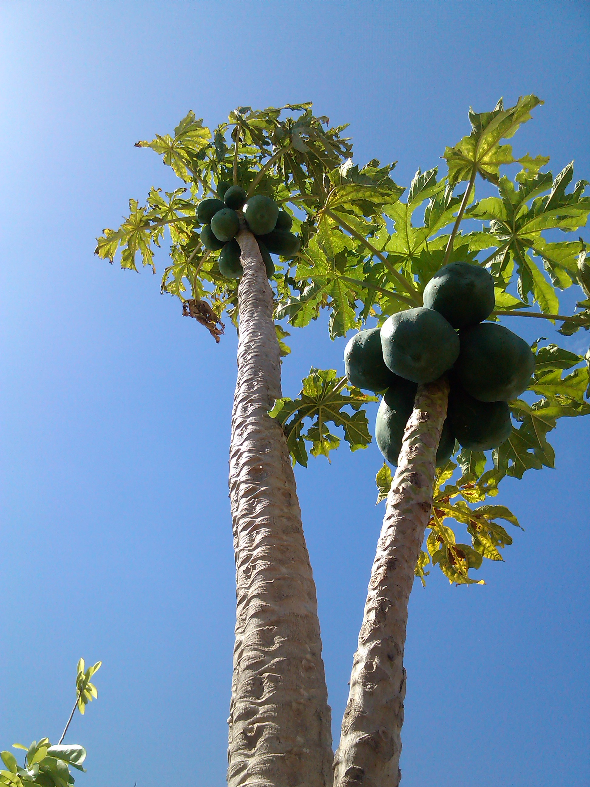 Árbol de Lechoza (Carica papaya) Santa Ana de Paraguaná